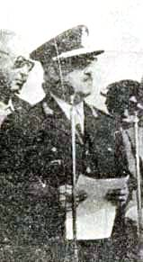 El General de brigada D. Tomás Caballero durante un discurso en la inauguracion de Mauinista Savio